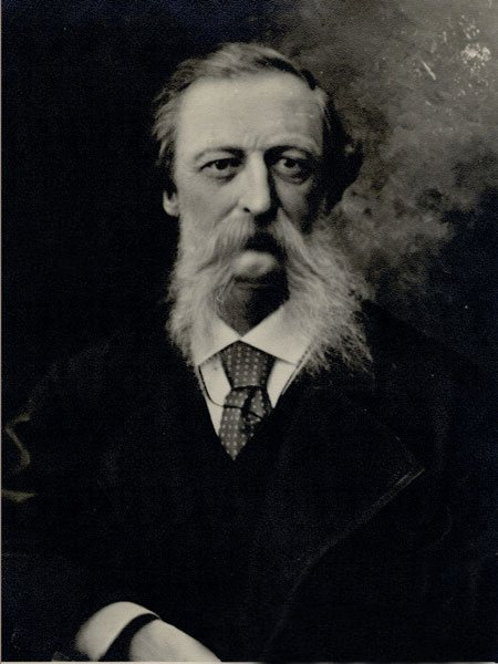 Василий Александрович Пашков (1831-1902)